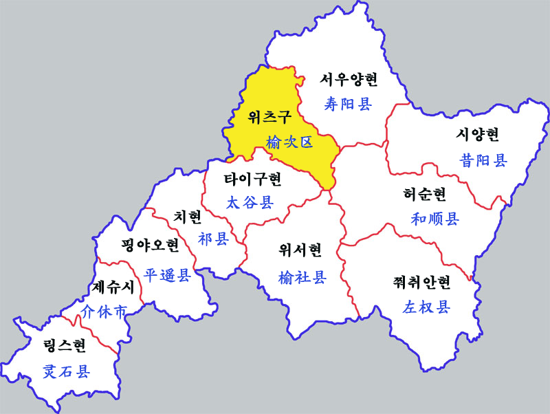 진중시 현급구역